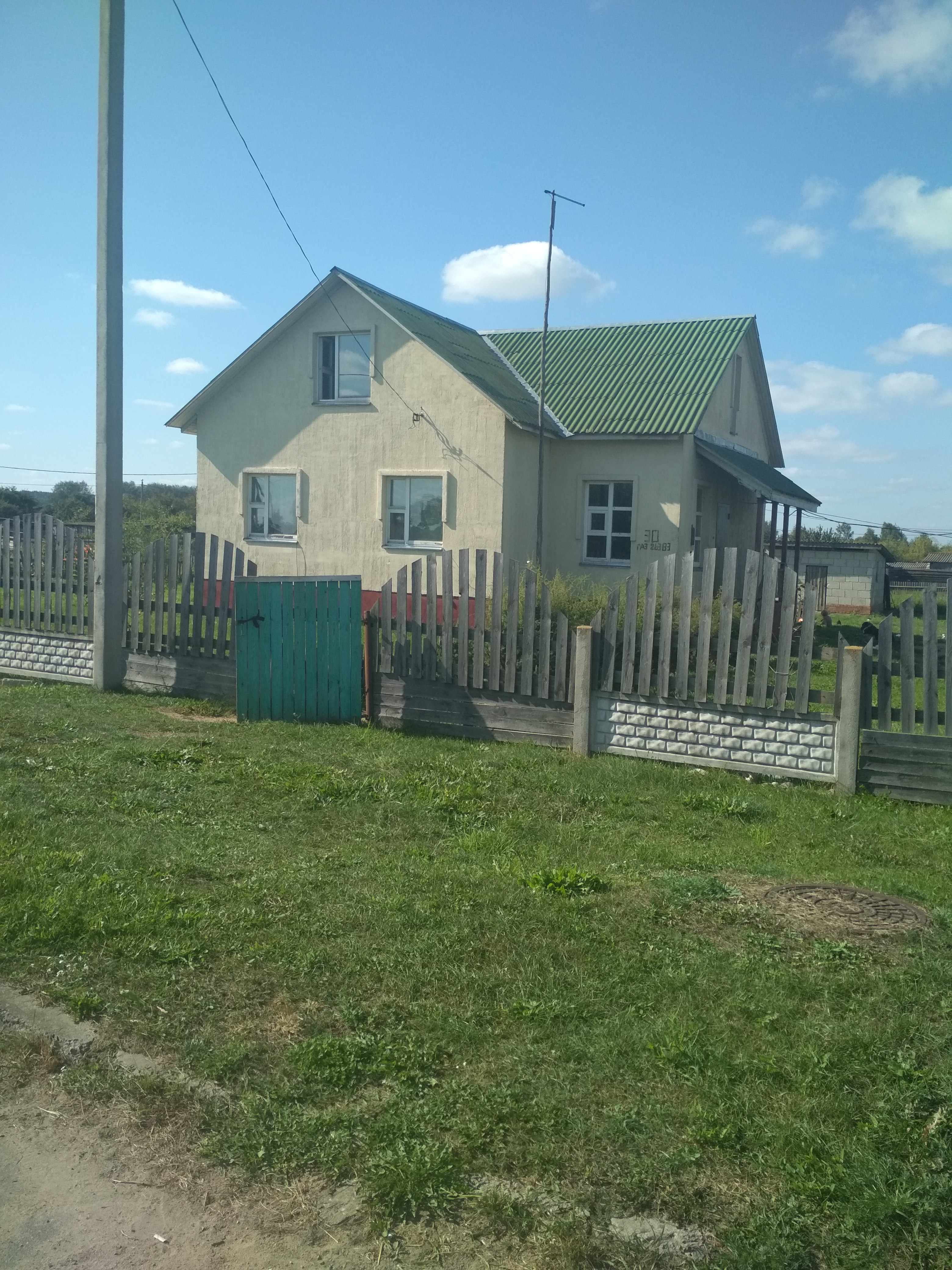 Жылы дом